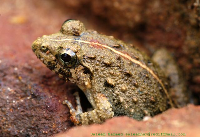 Fejervarya limnocharis, India